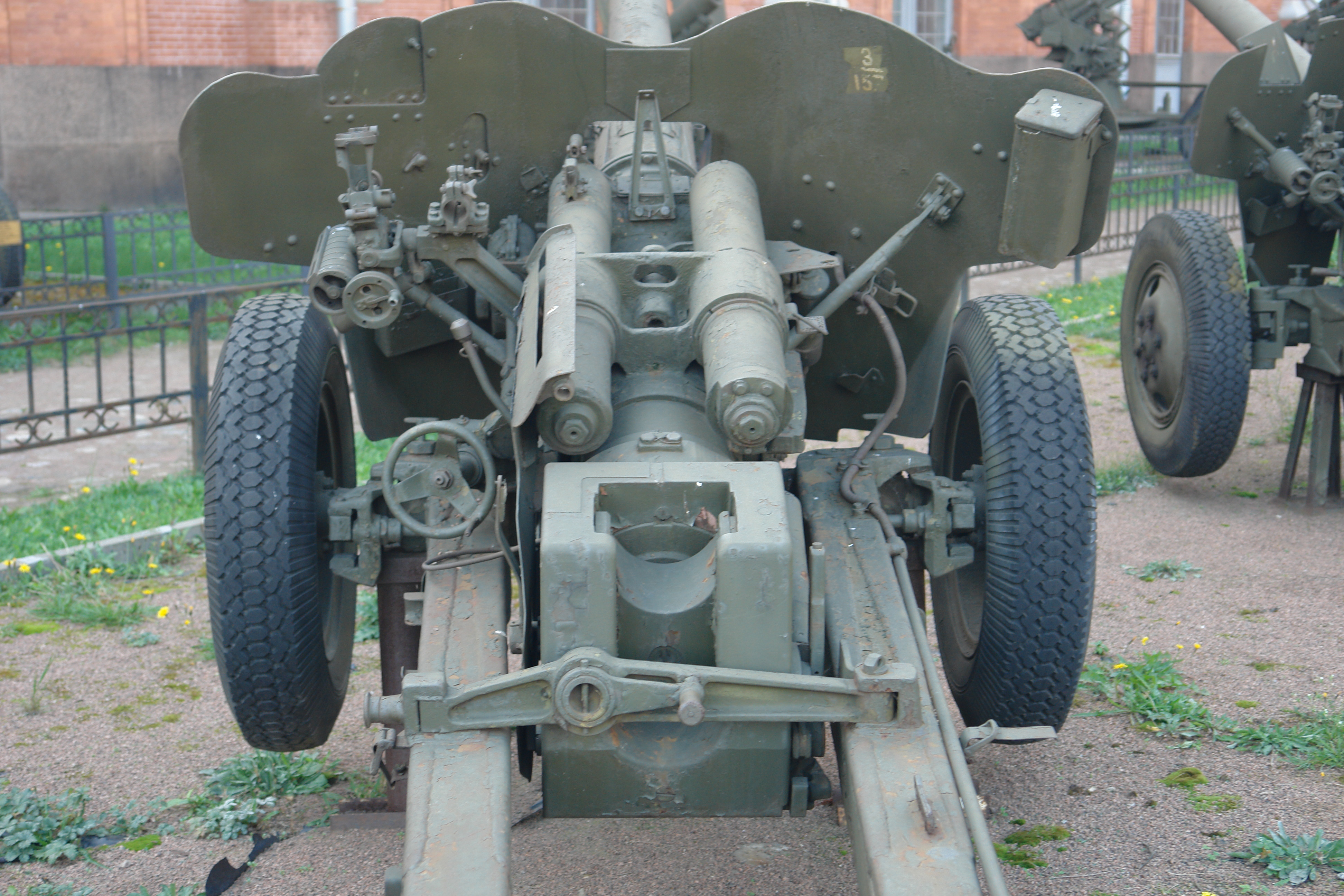 85-мм противотанковая пушка Д-48 (1953). Главный конструктор Ф.Ф. Петров Дальность, м: стрельбы - 18970, прямого выстрела - 1200. Скорострельность - 15 выстр/мин Масса орудия -2350 кг. Военно-исторический музей артиллерии, инженерных войск и войск связи, Санкт-Петербург.